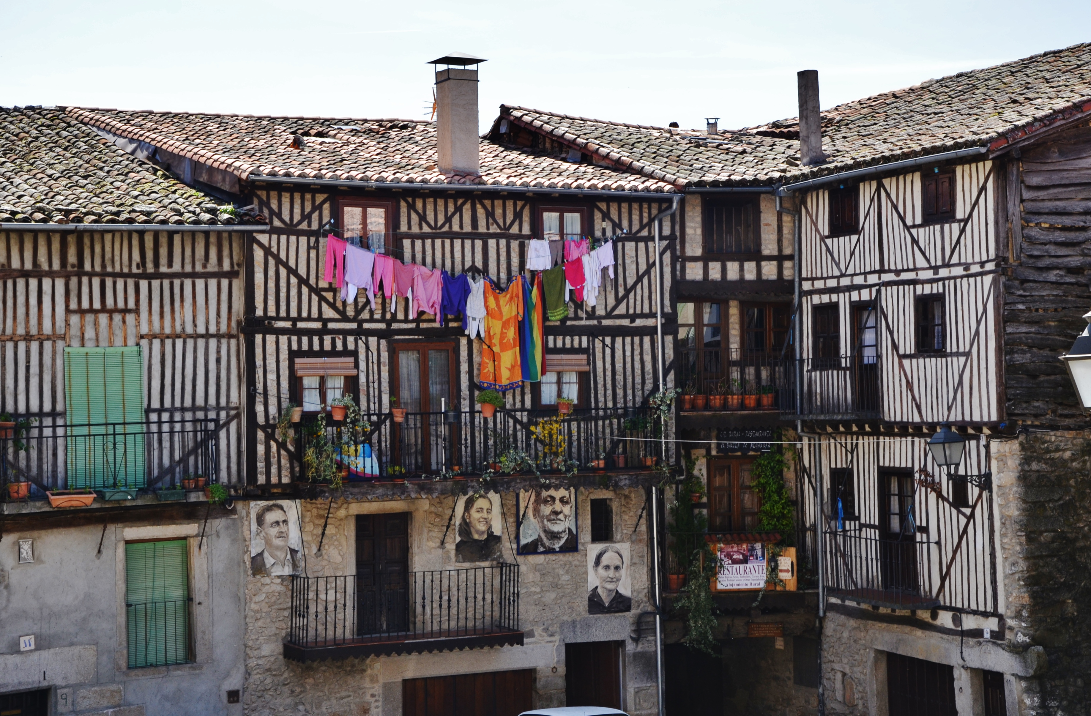 La Plaza de Mogarraz, Salamanca